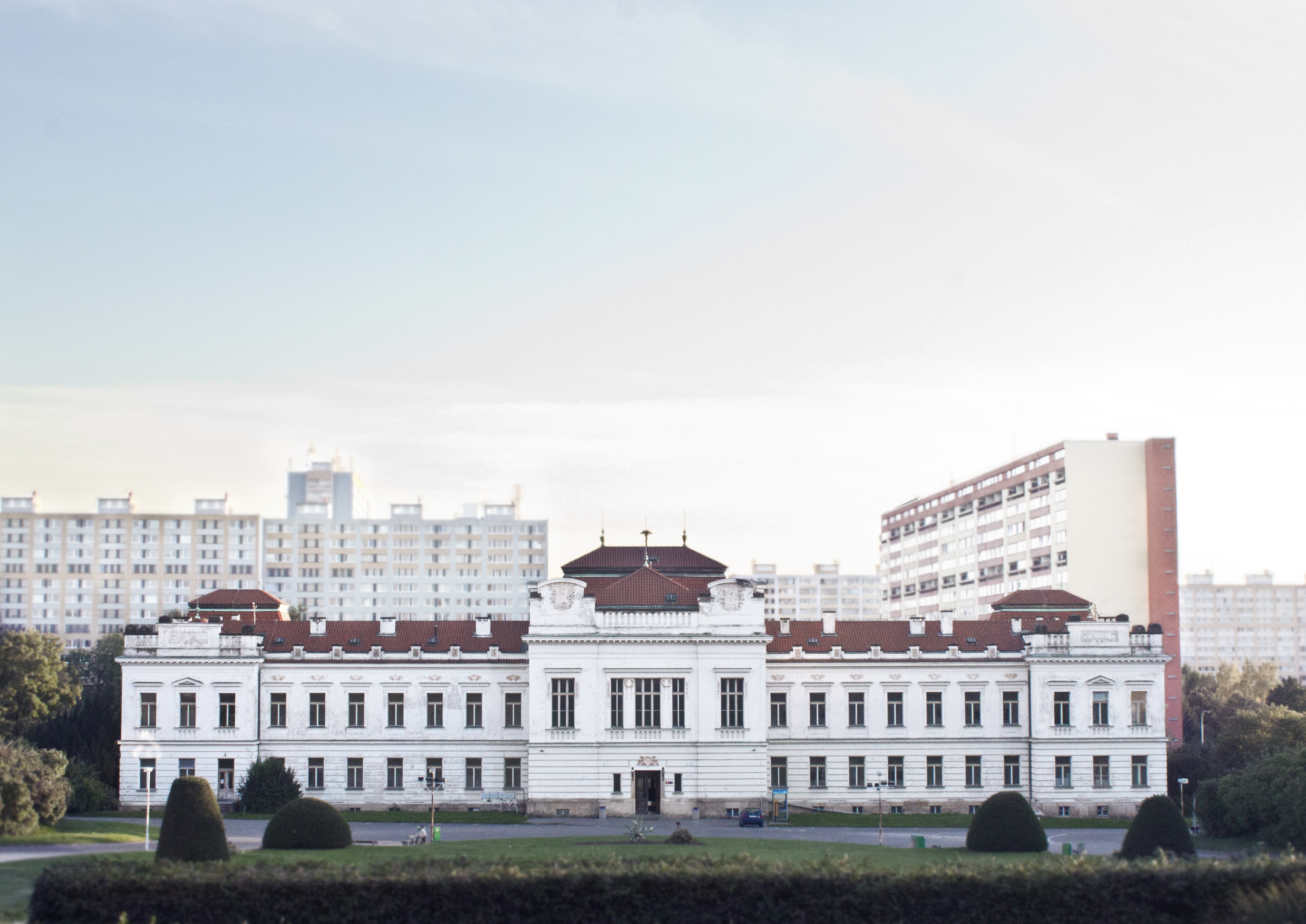 Psychiatrická léčebna Bohnice, Praha 8-Bohnice, hlavní budova – Ústavní 91/7.